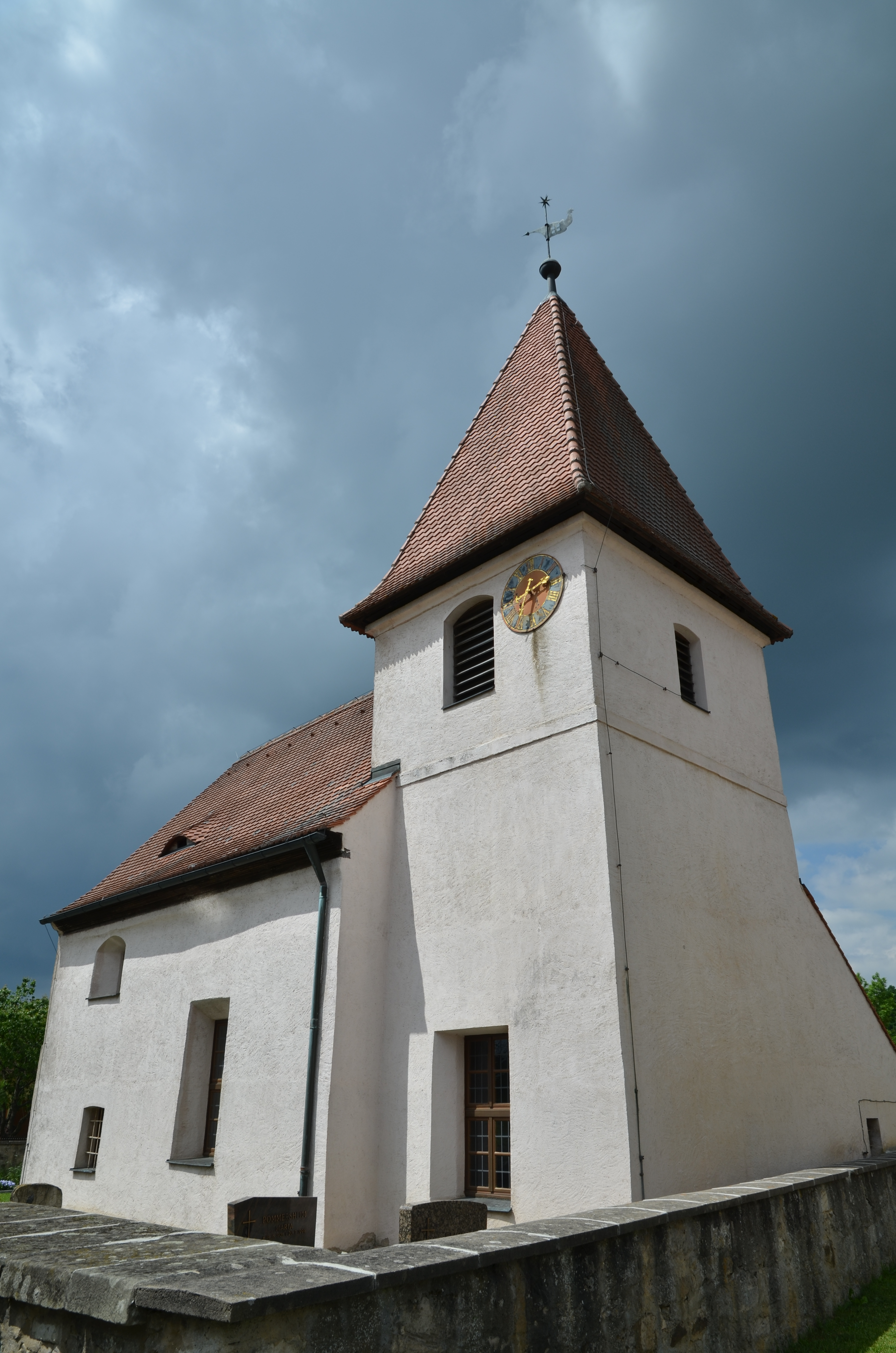 evang.-luth. Kirche St. Peter und Paul in Gräfenbuch